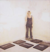 Autoportrait de la photographe Flore sur le Camp de Rivesaltes lors de son exposition Loin de l'Espoir aux Journées du Patrimoine 2006.